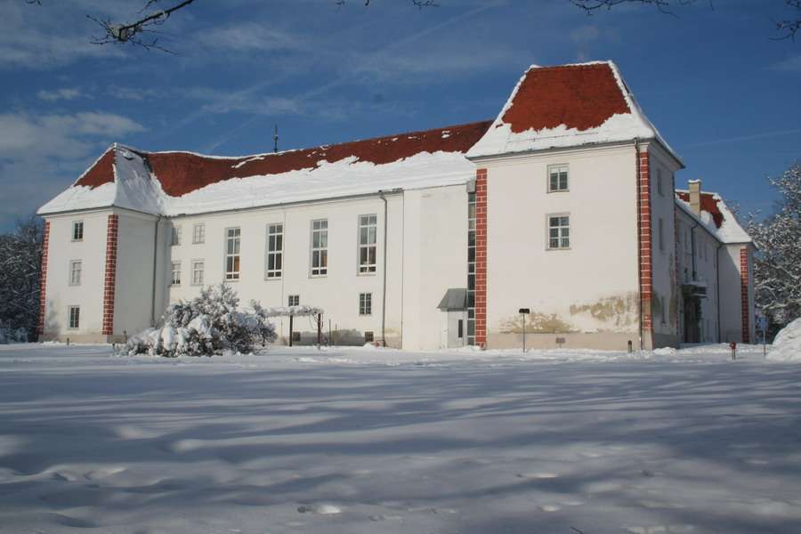 Murskosoboški grad